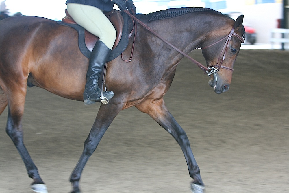 Beautiful bay Morab